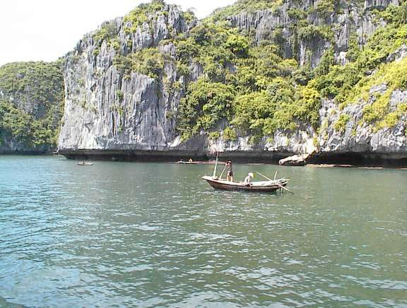 Paysage de la baie d'Along - Rocher, végétation, grotte et barqe.